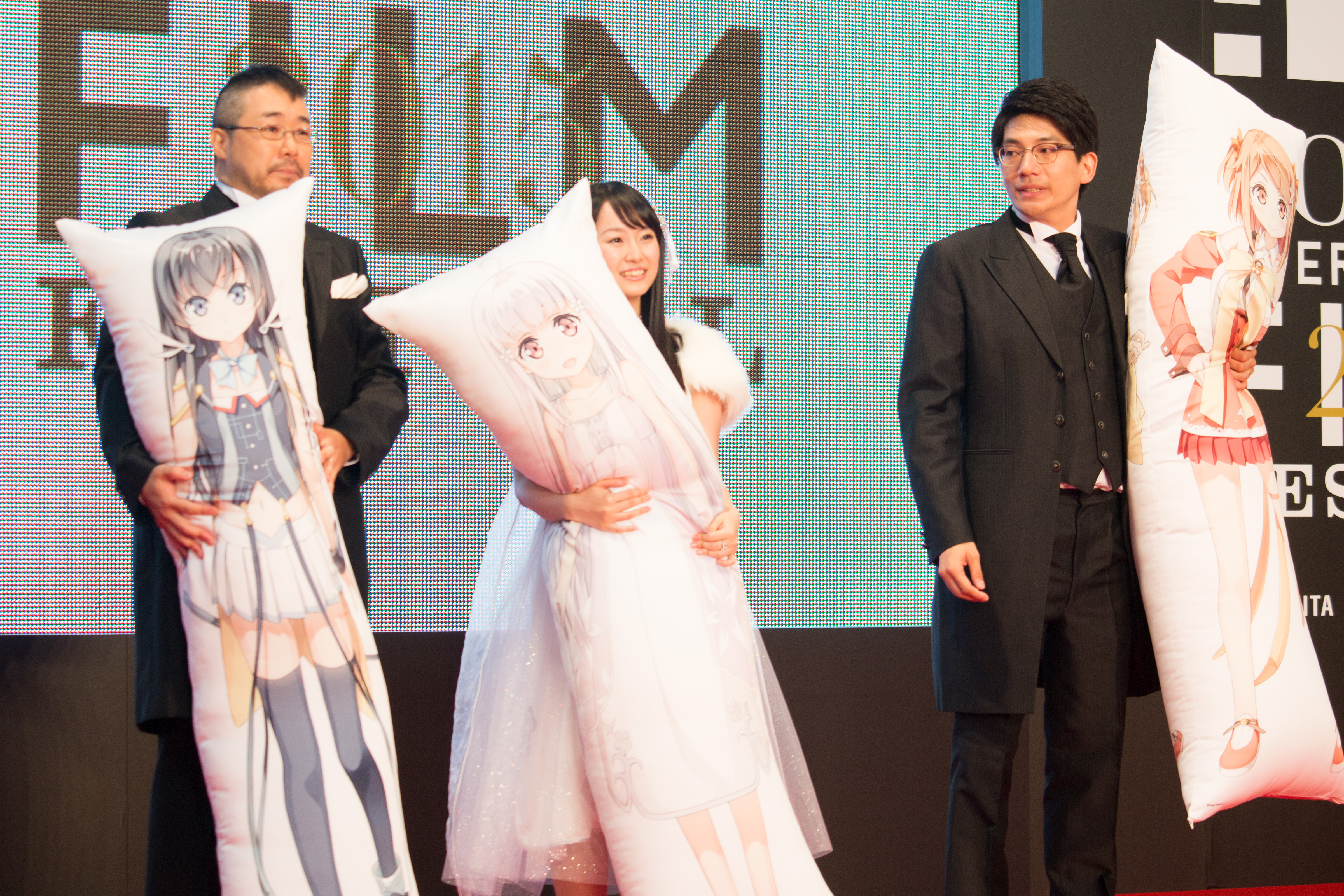 第28回 東京国際映画祭 オープニングセレモニー 花守ゆみり 石浜真史 石原良一 (ガラスの花と壊す世界)